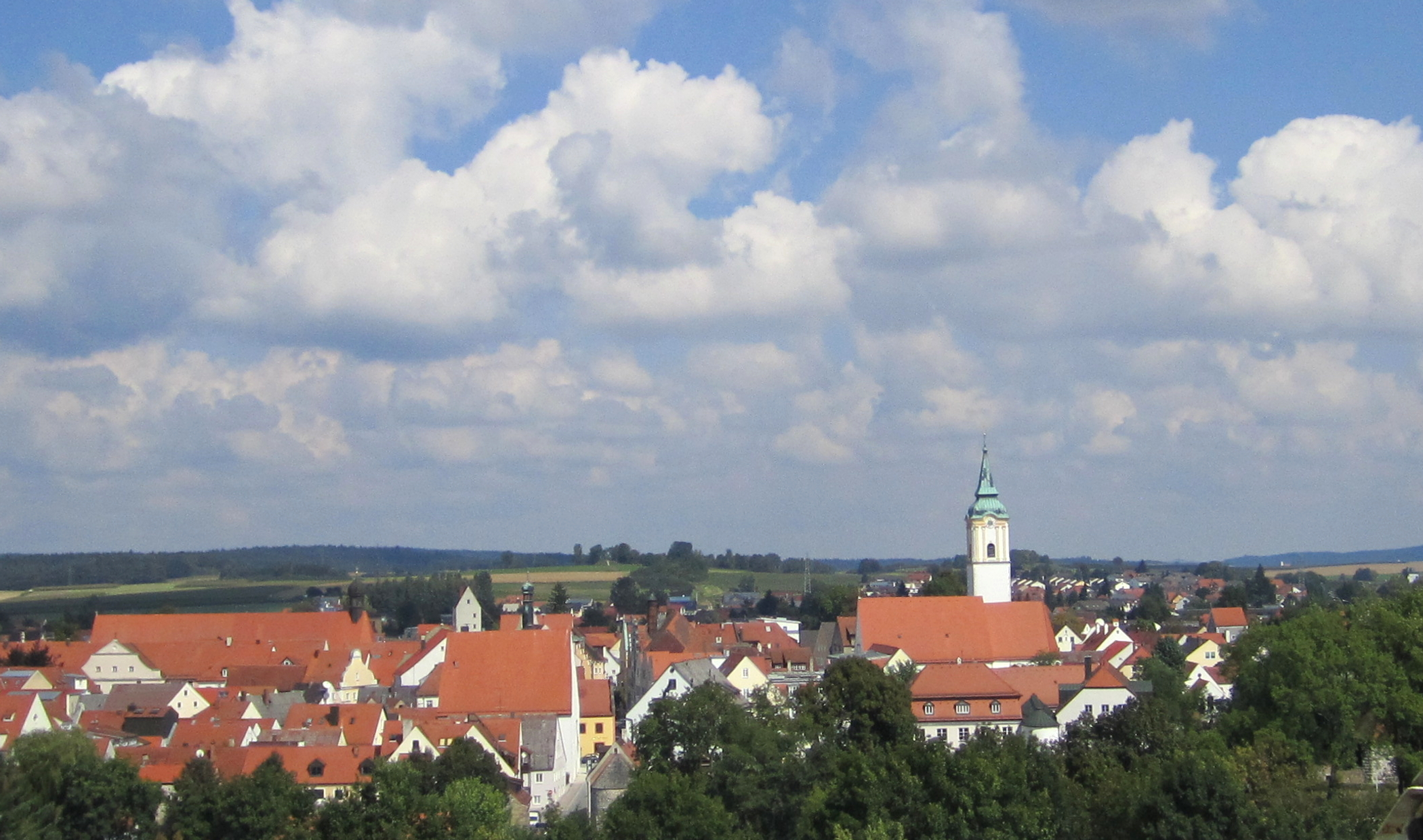 Abensberg, Landkreis Kelheim, Niederbayern:Stadtansicht